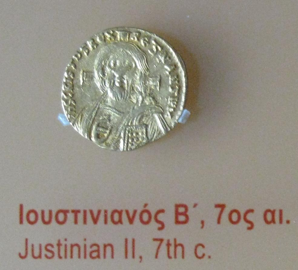 Numismatic Museum, Athens, Greece --- Ιουστινιανός Β', 7ος αι. Νομισματικό Μουσείο, Αθήνα.